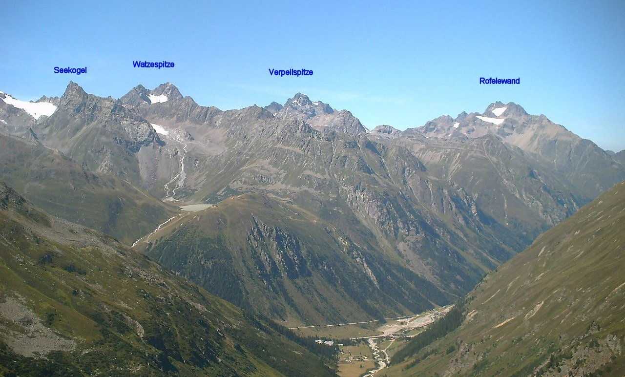 Kaunergrat Panoramablick